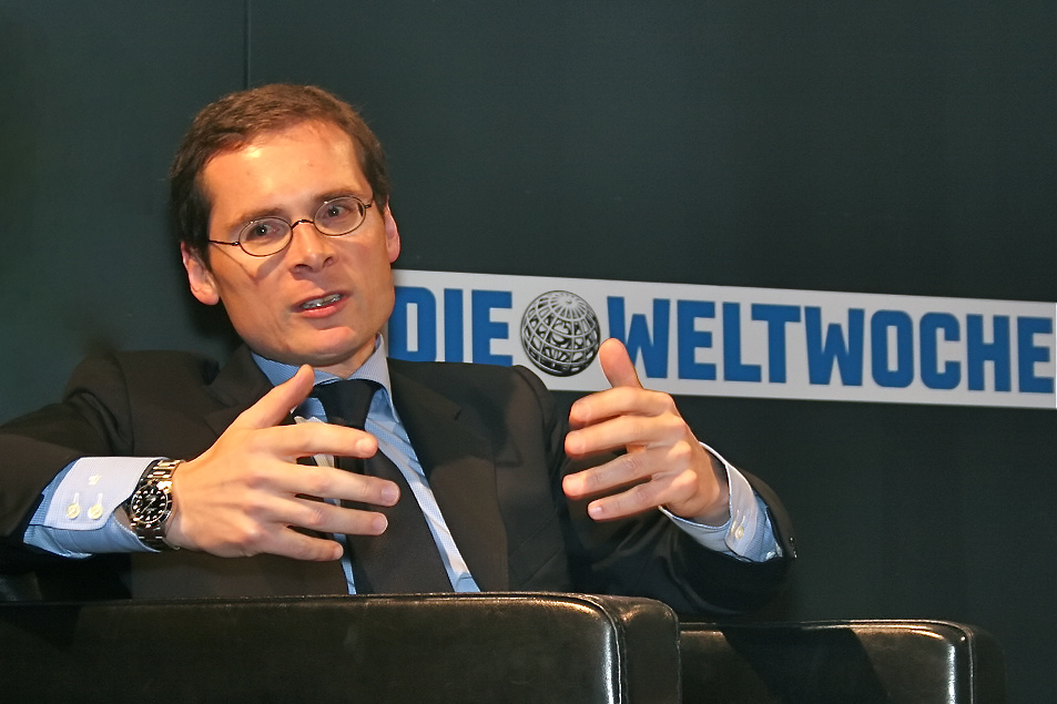 Roger Köppel, Journalist und Chefredakteur der "Weltwoche" in Zürich